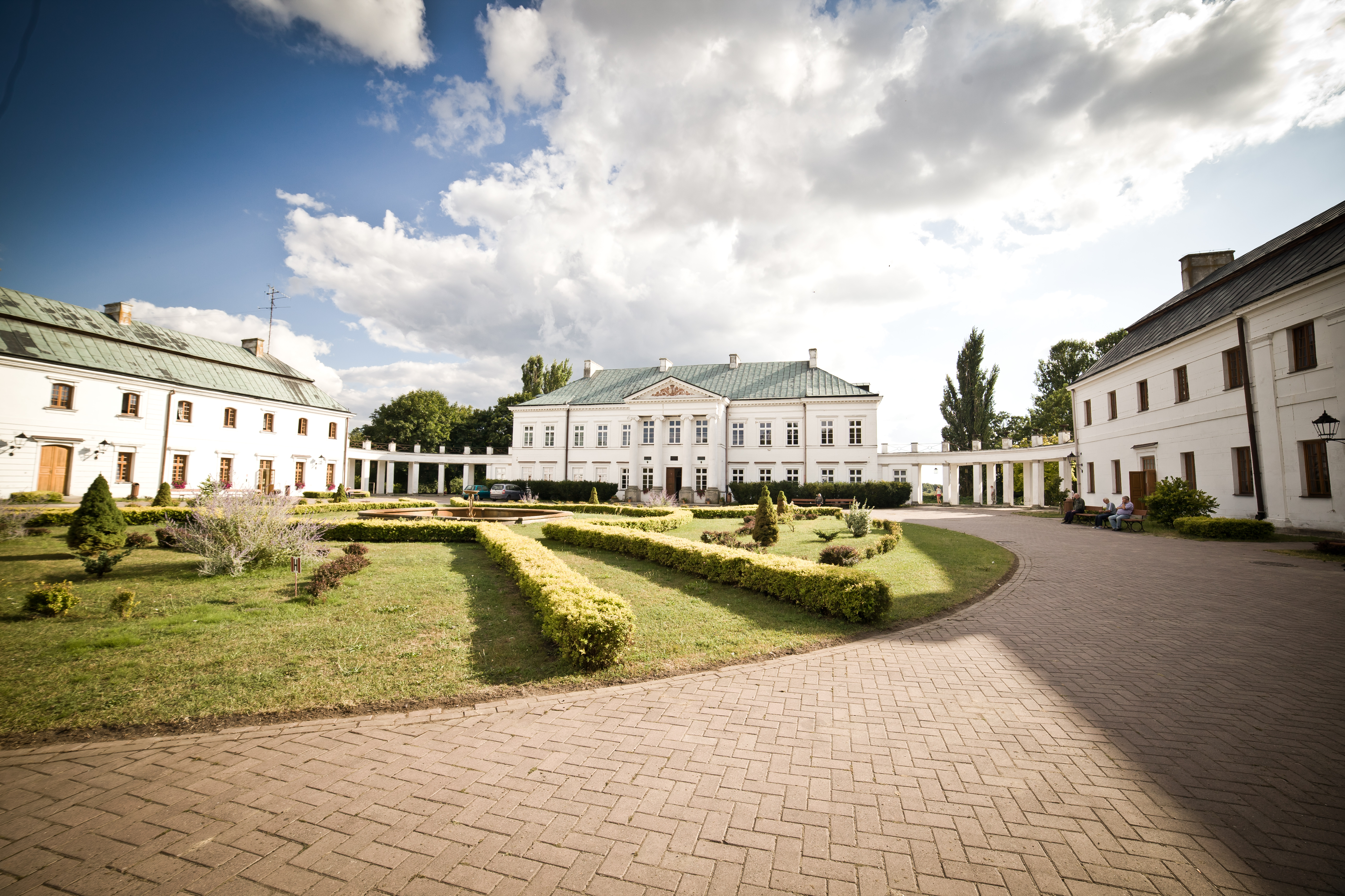 Pałac Jabłonowskich w Kocku